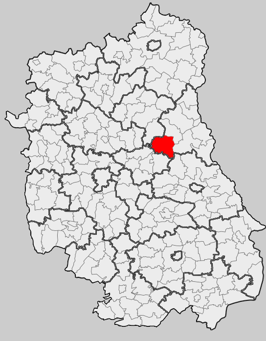 Map of gmina Urszulin, Włodawa county, Lublin voivodship Mapa gminy Urszulin, powiat włodawski, województwo lubelskie